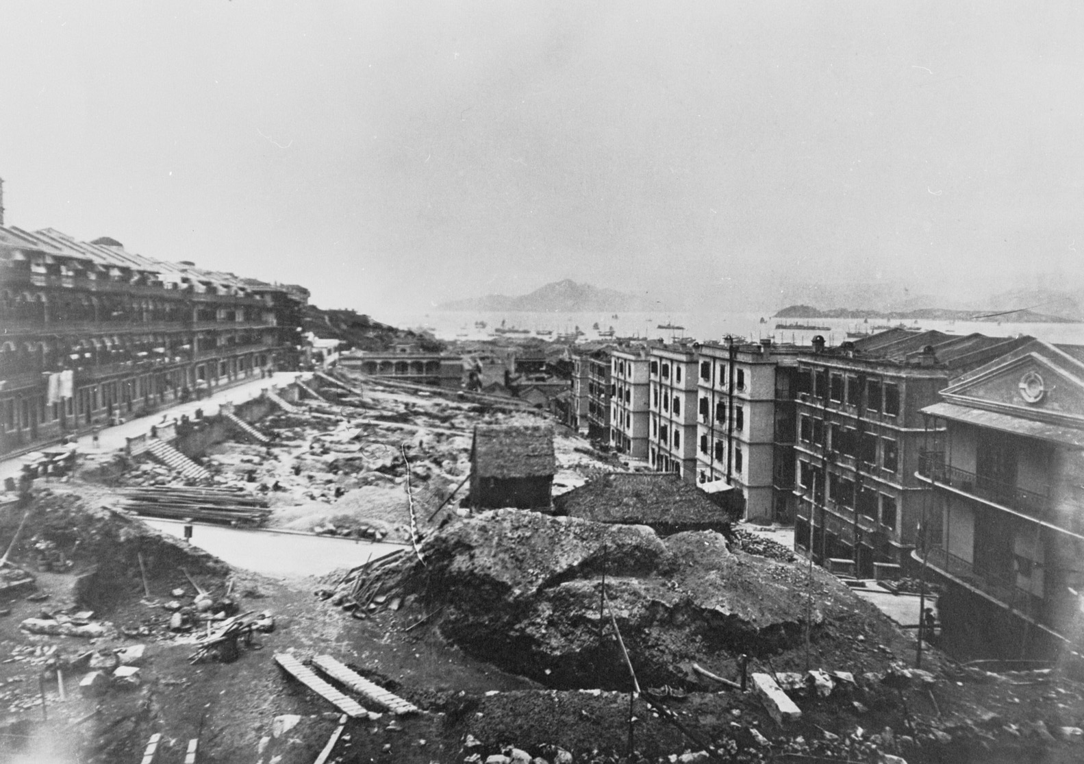 中文（香港）: 建築工程進行中的太平山區（1898年）。